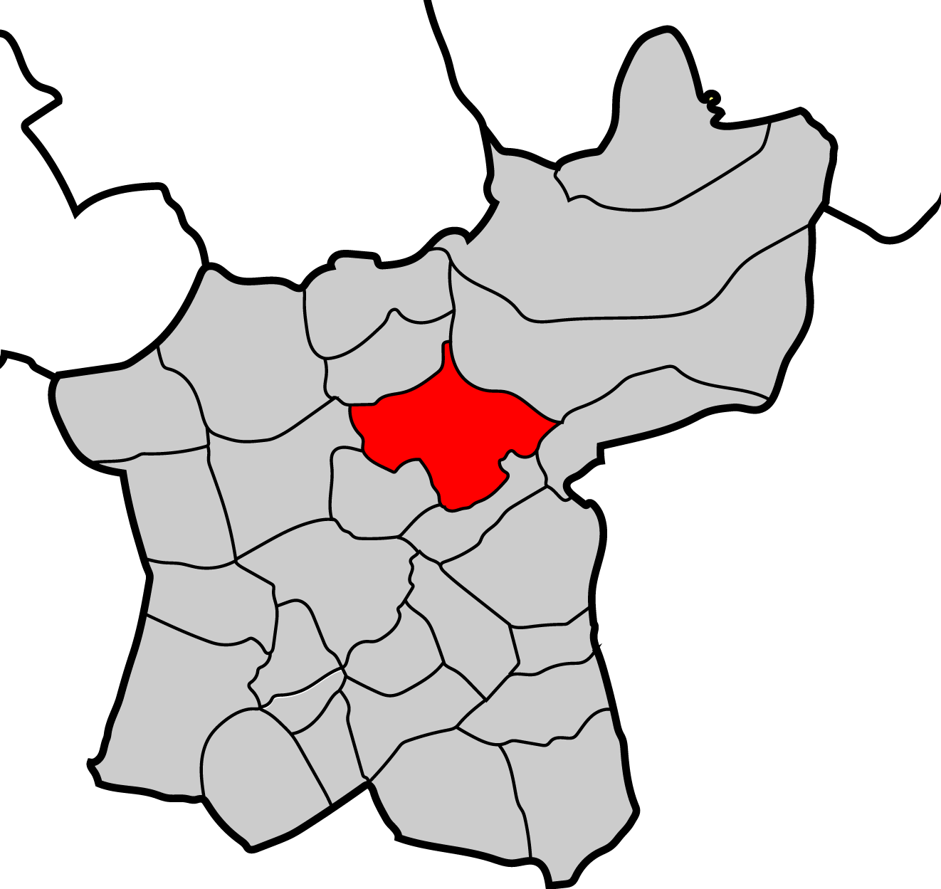 Mapa parroquia de Arroxo Baralla